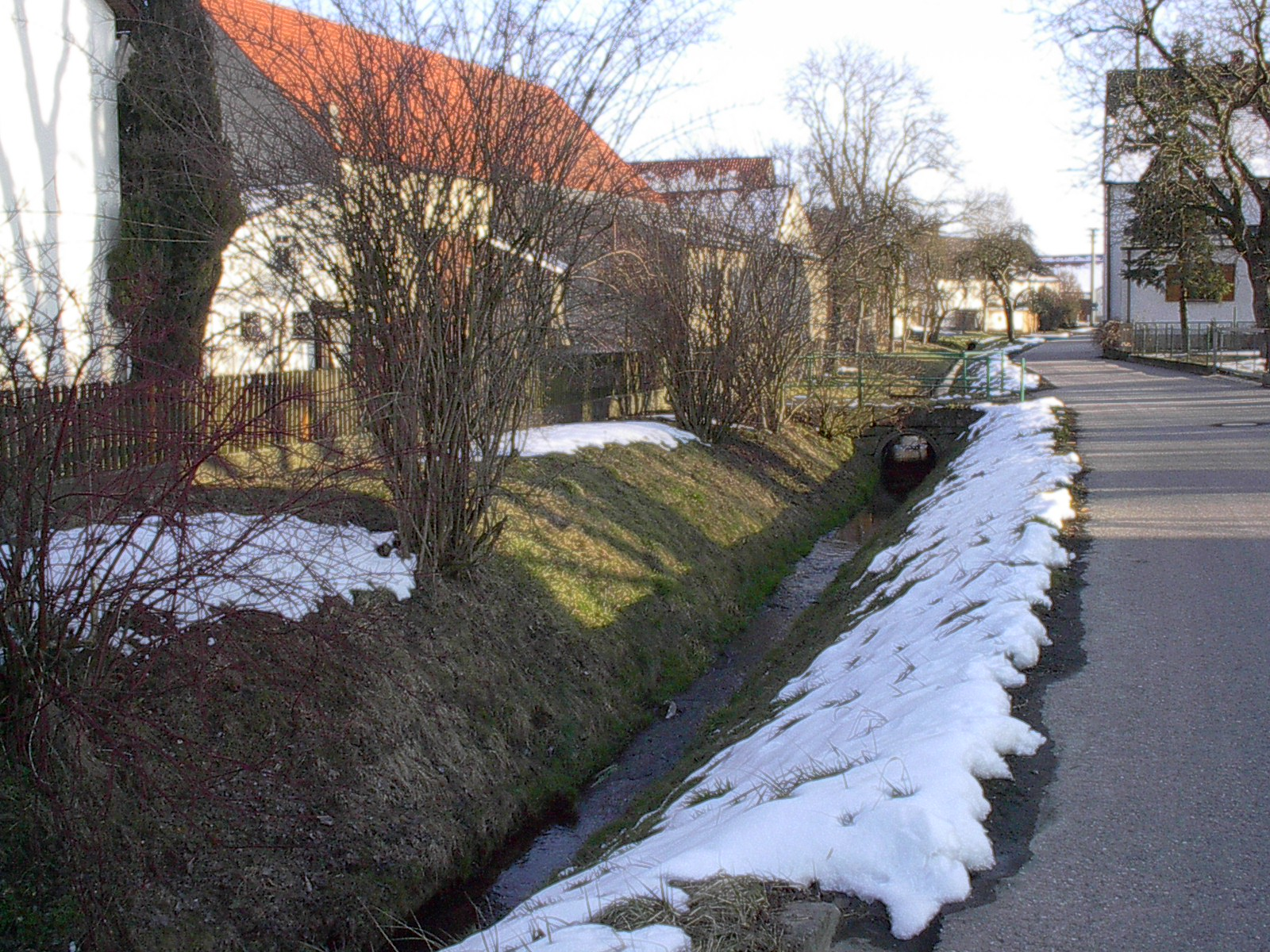 Der Leitenbach schlängelt sich durch den Ort Illdorf